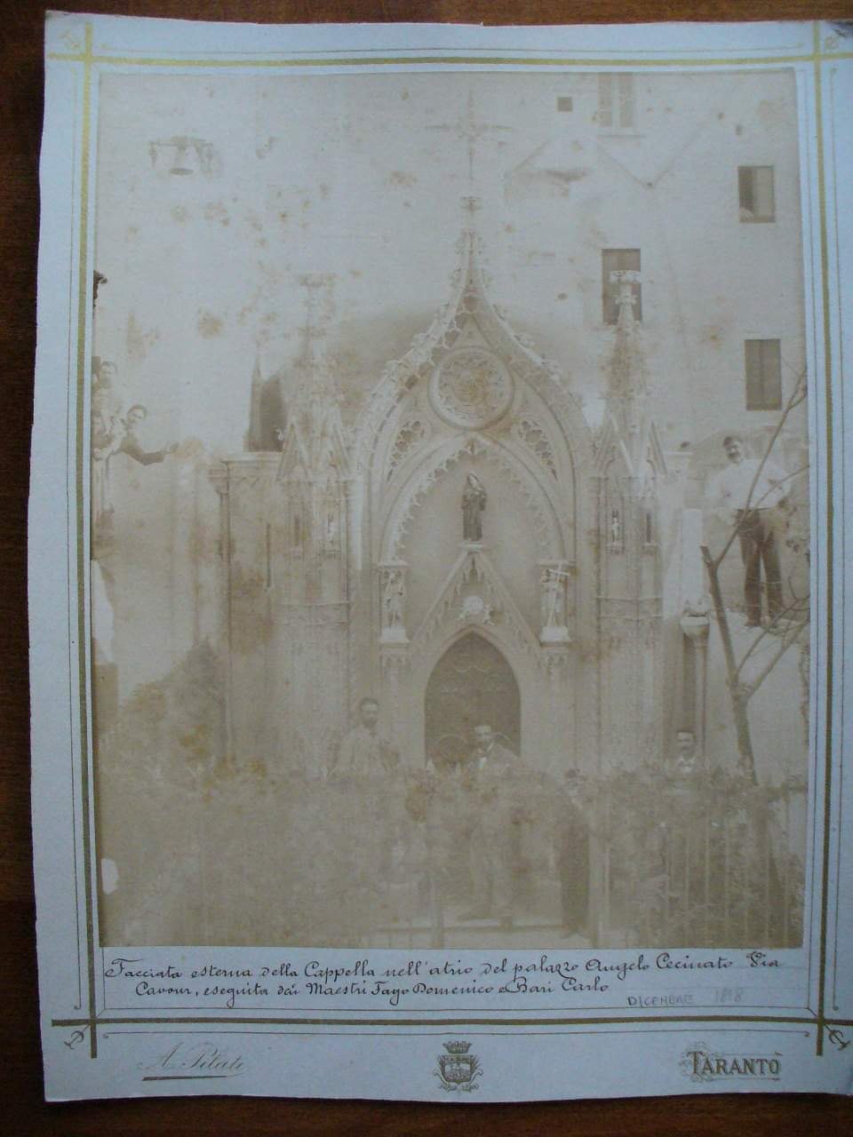 Inaugurazione Chiesetta